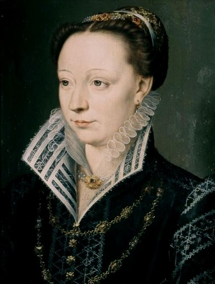 Claude de Clermont-Tonnerre de Vivonne oder Anne de Velez de Guevera (Tochter von Francois Marie da Gondy, Botschafter von Spanien)